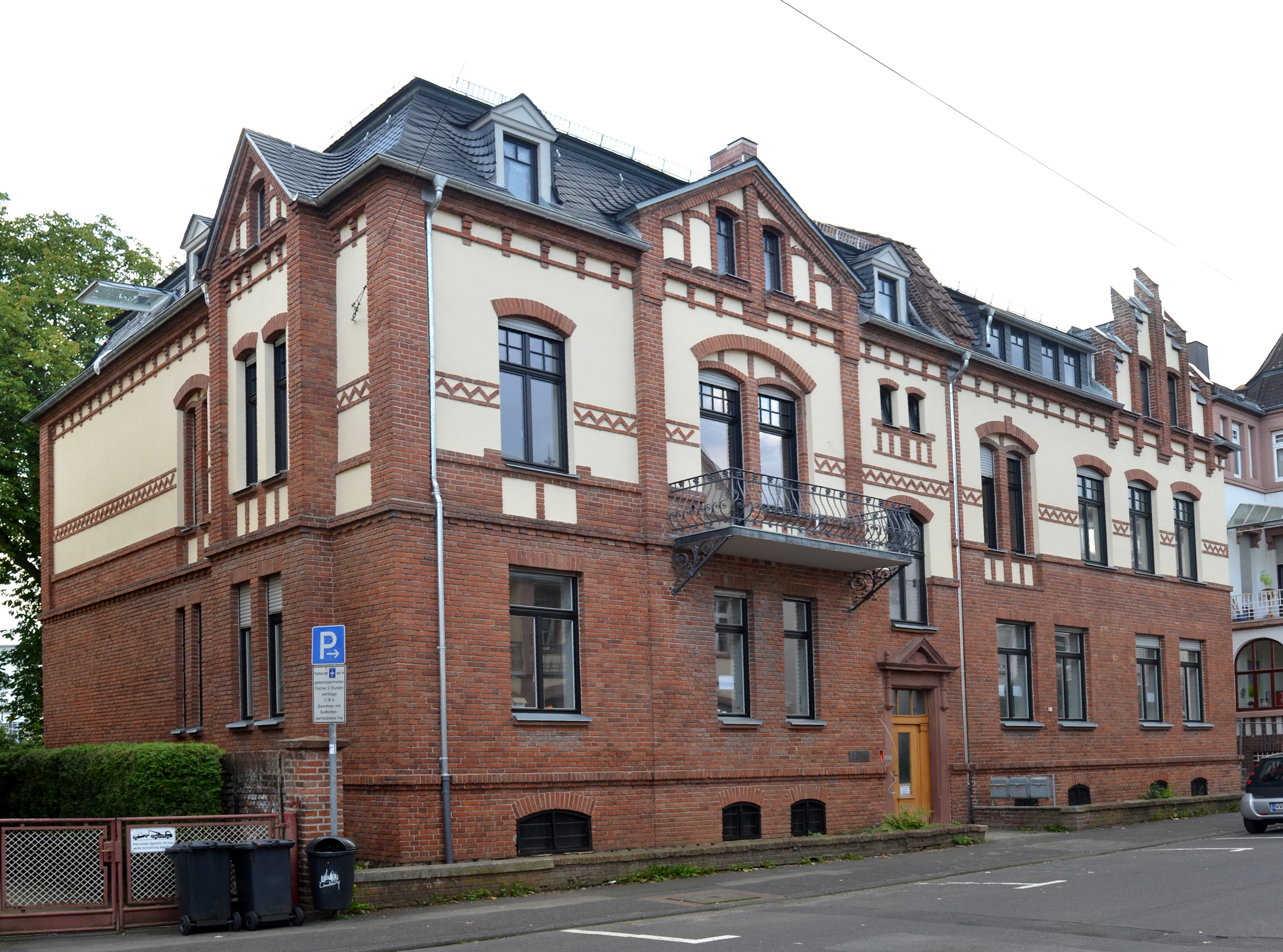 Limburg. Parkstraße 11-13